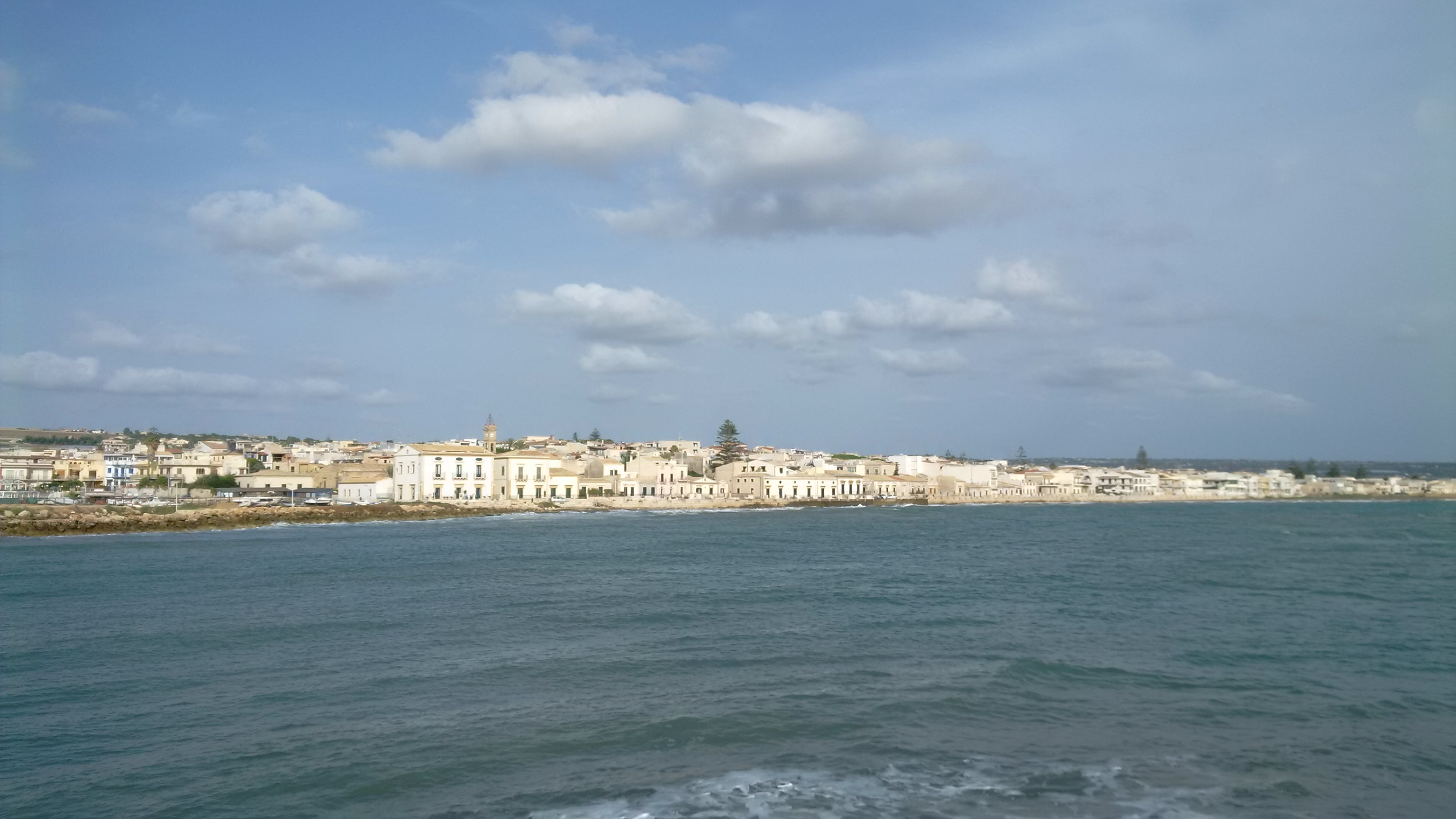 Porto di Donnalucata